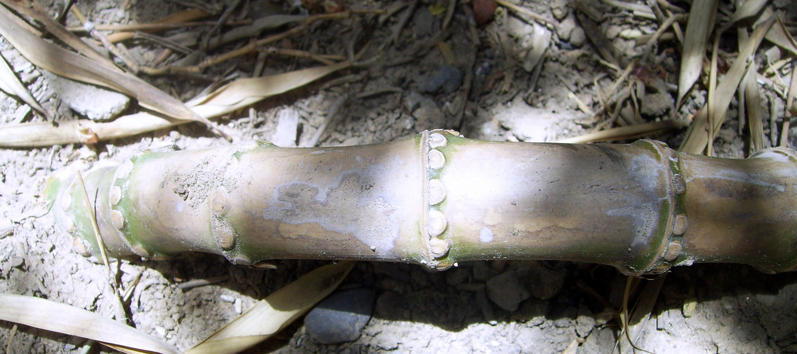 竹鞭，摄于紫竹院